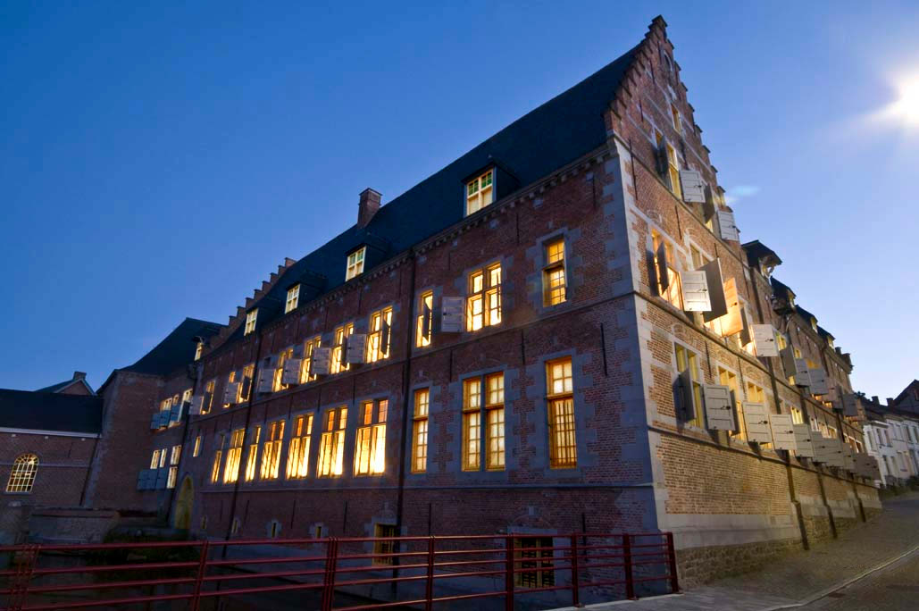 HNDR la nuit